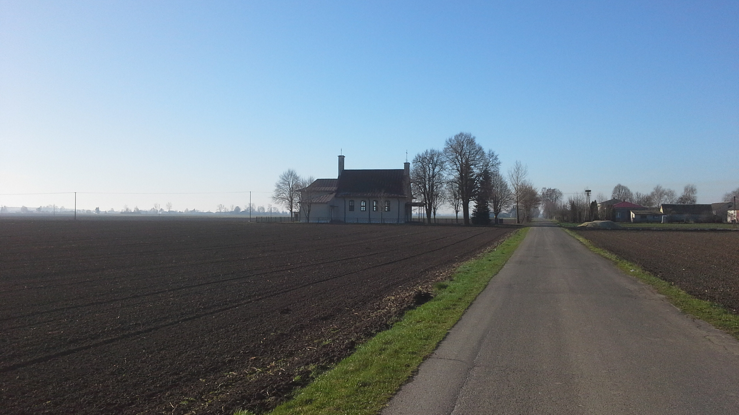 Widok na kościół w Ślipczu